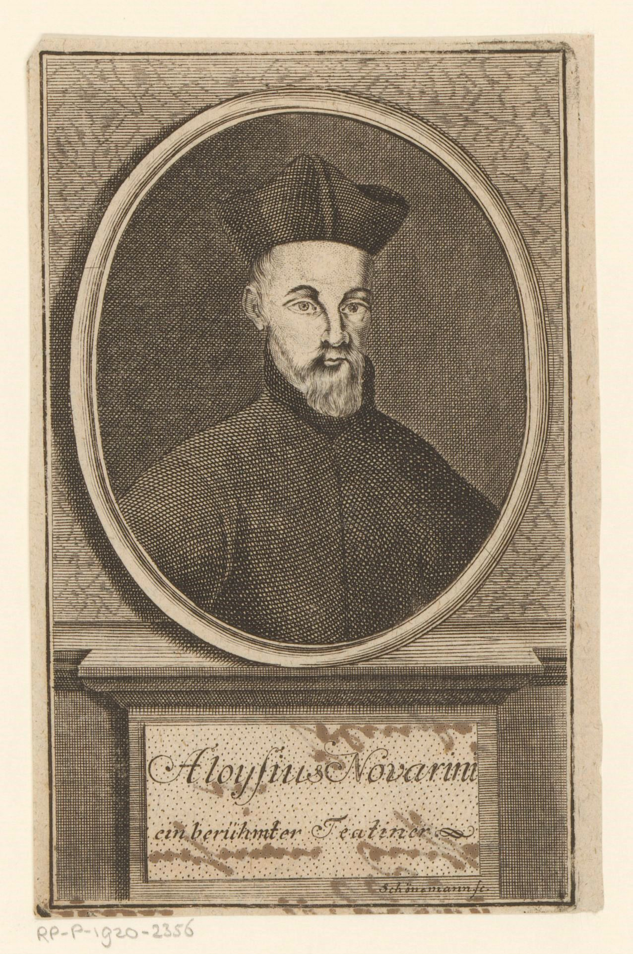 IdentificatieTitel(s): Portret van Luigi NovariniObjecttype: prent boekillustratie Objectnummer: RP-P-1920-2356Catalogusreferentie: HAB A 15135Opschriften / Merken: verzamelaarsmerk, verso, gestempeld: Lugt 2228VervaardigingVervaardiger: prentmaker: Friedrich Schoenemann (vermeld op object)Plaats vervaardiging: DuitslandDatering: 1739Fysieke kenmerken: gravureMateriaal: papier Techniek: graveren (drukprocedé)Afmetingen: blad: h 151 mm × b 98 mmToelichtingOok gebruikt in: Fortgesetzte Sammlung Von Alten und Neuen Theologischen Sachen. 4.Beytrag Auf das Jahr 1739. Leipzig: Romanus Friedrich Braun.OnderwerpWat: historical personsWie: Luigi NovariniVerwerving en rechtenVerwerving: aankoop 1905Copyright: Publiek domein